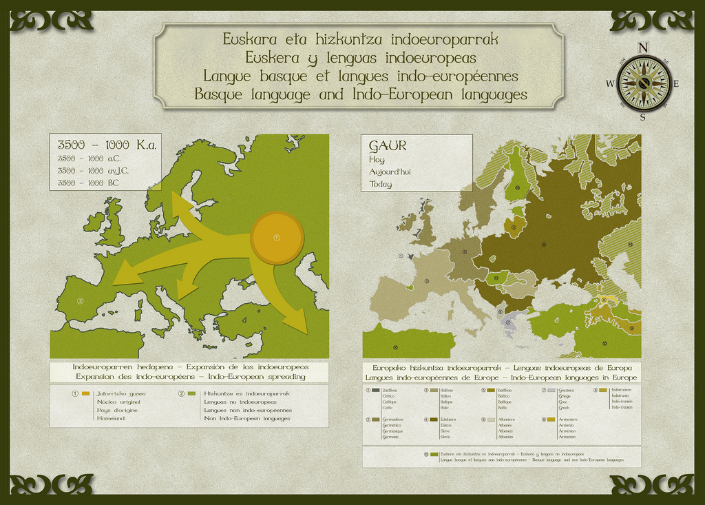 Euskara eta hizkuntza indoeuroparrak.